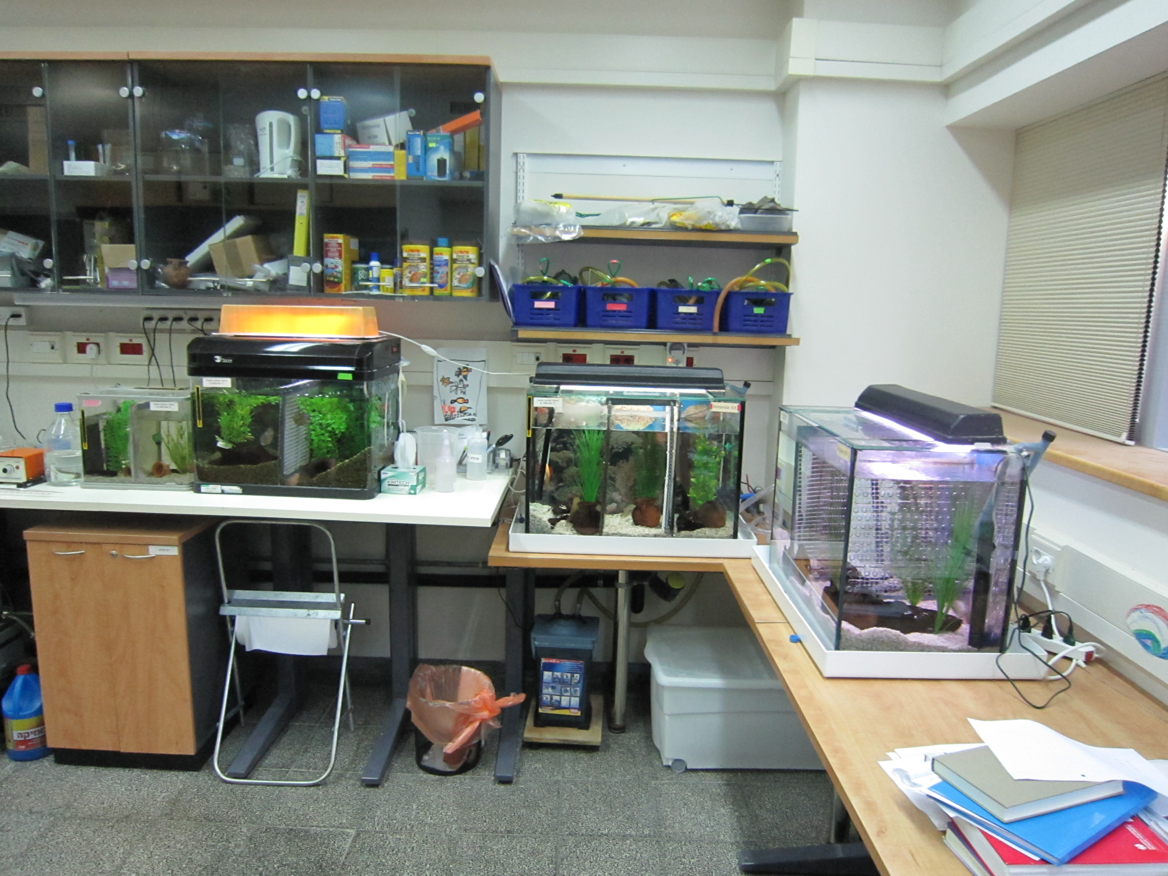 בנין הפקולטה לפיזיקה בטכניון